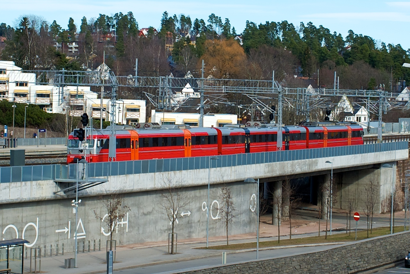 NSB type 69, Lysaker stasjon.